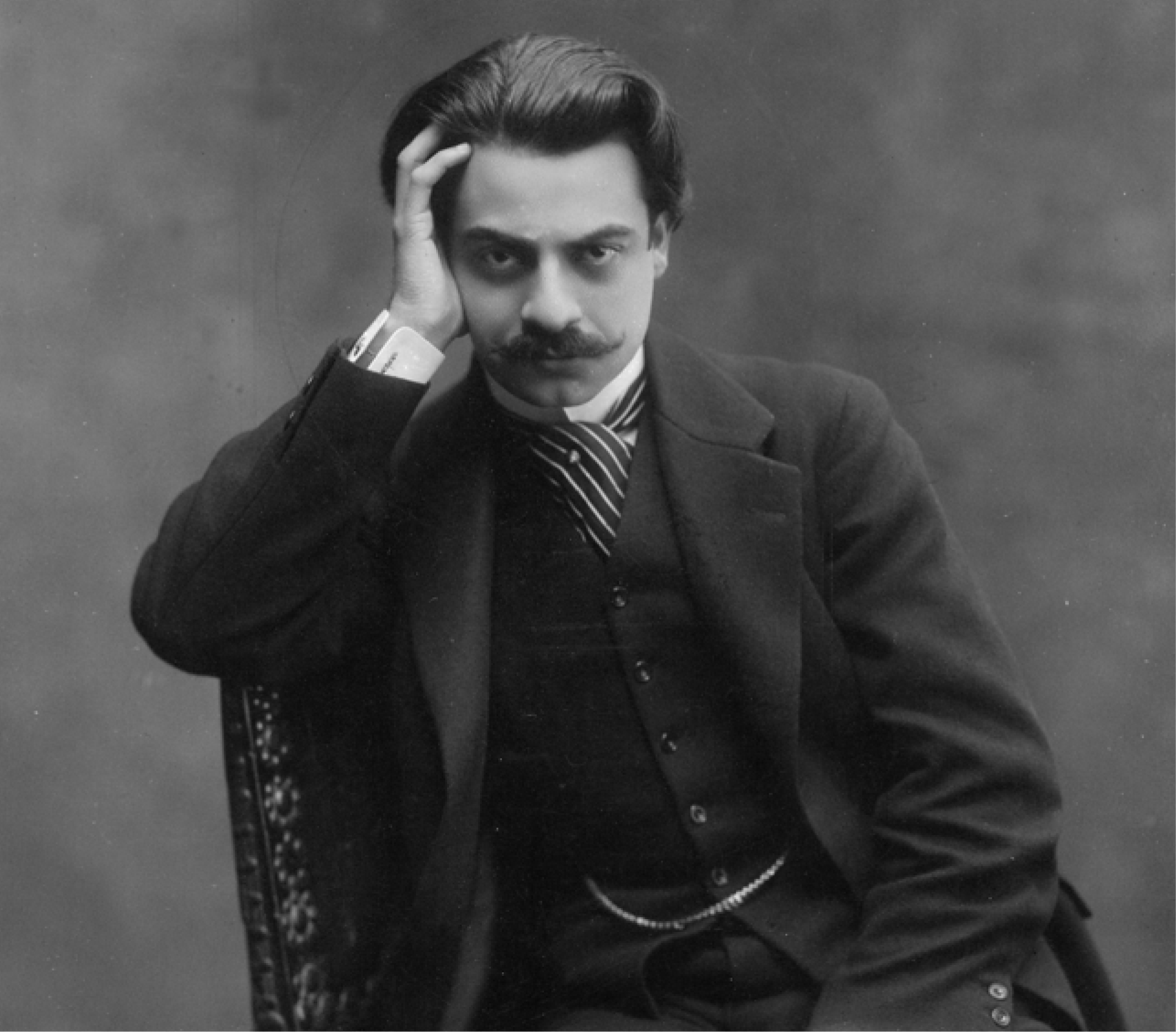 Ricardo Rojas